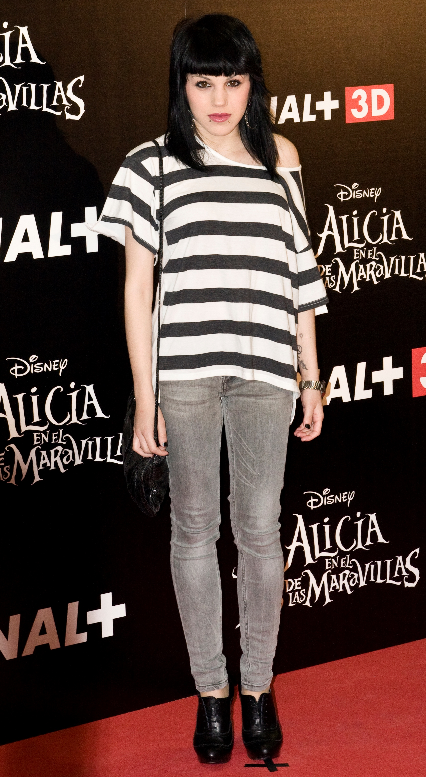 Angy Fernández cantante y actriz española